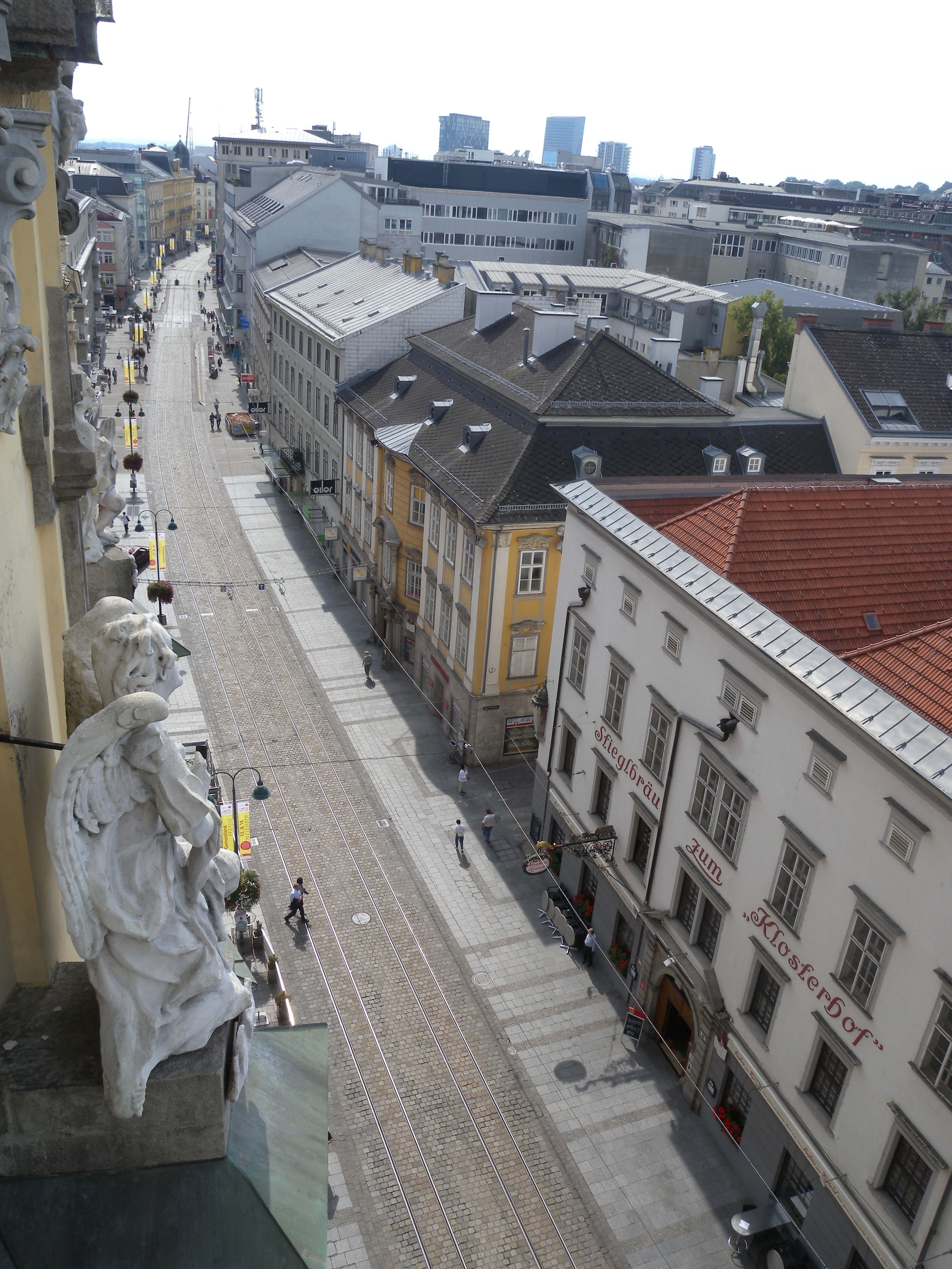 Blick von einem Turm der Ursulinenkirche auf die Linzer Landstraße